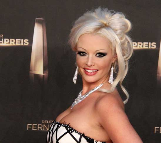 Daniela Katzenberger beim Deutschen Fernsehpreis 2012